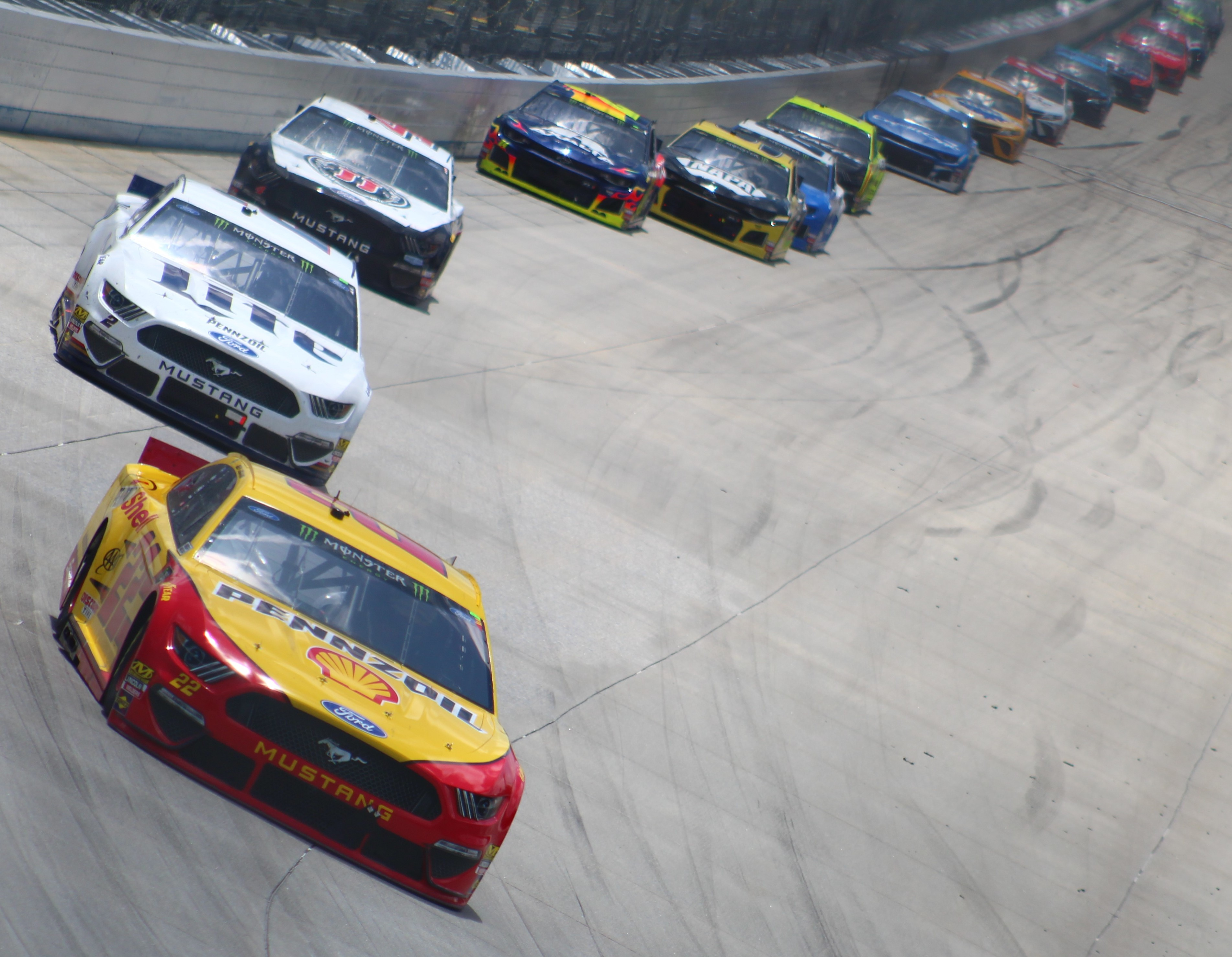 2019 Gander RV 400